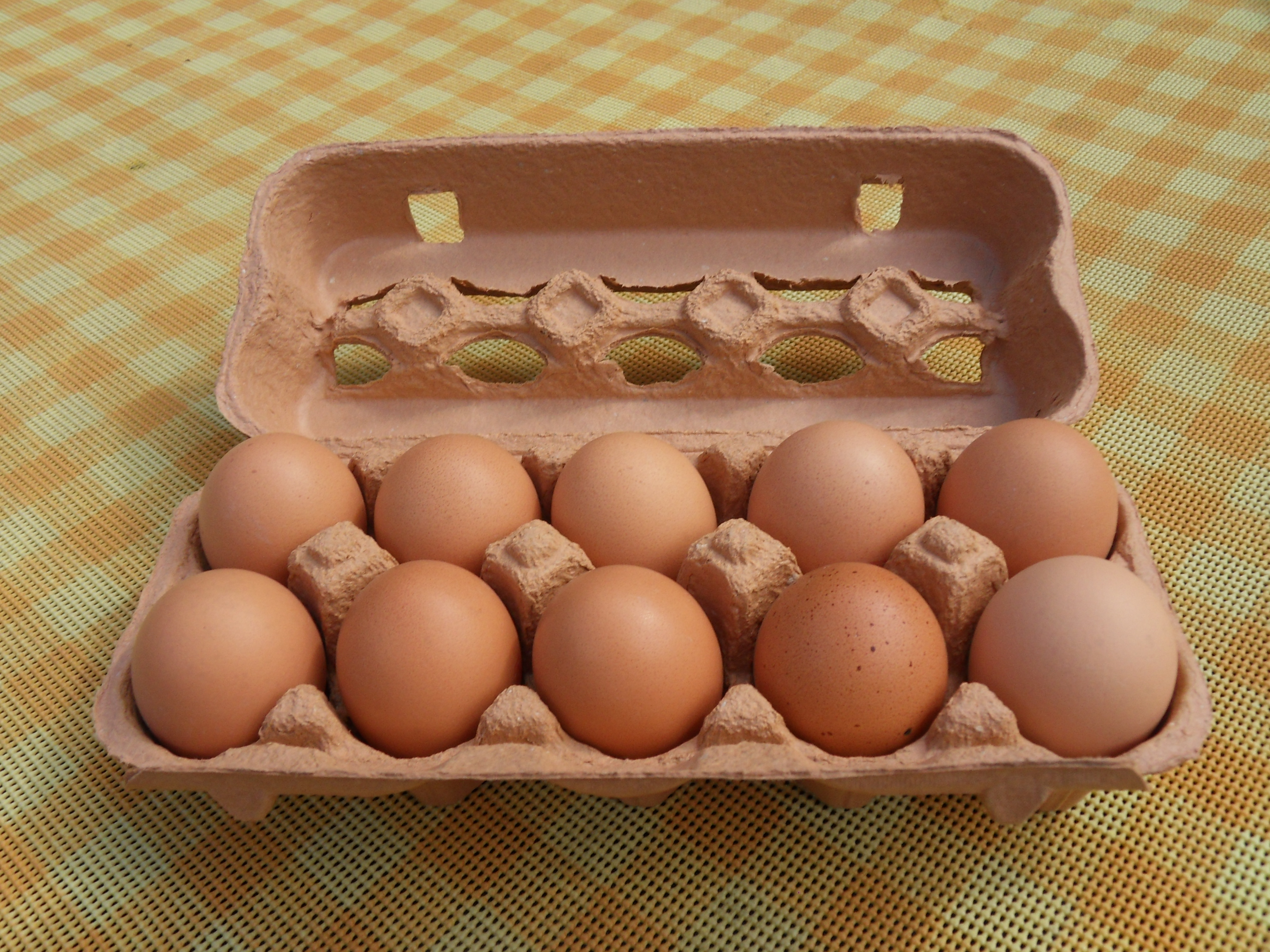 een doos met 10 eieren erin